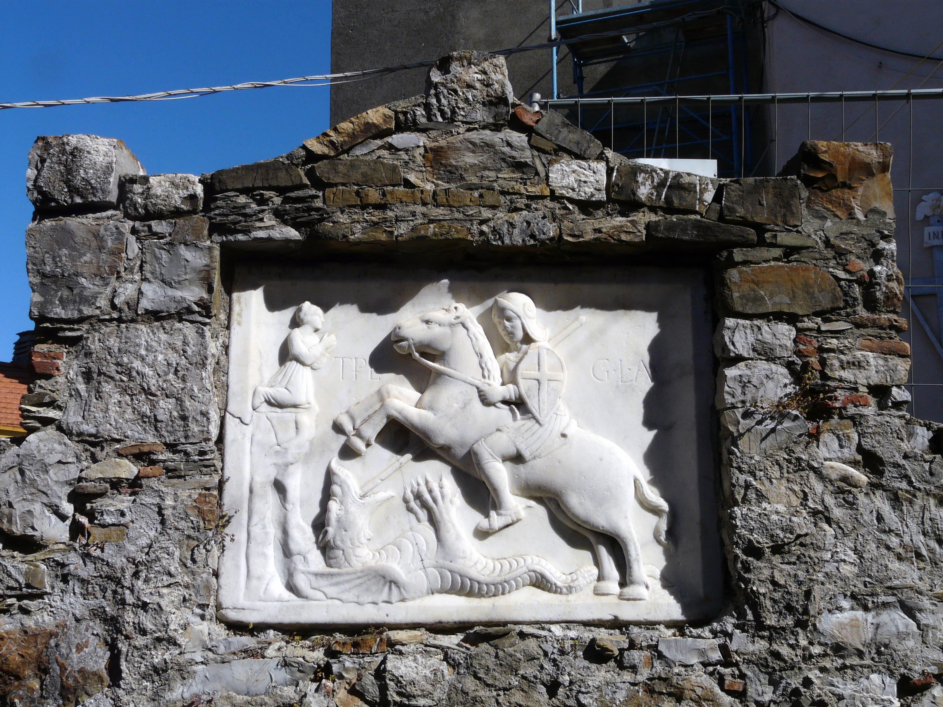 Bassorilievo di San Giorgio, Ponzano Superiore, Santo Stefano di Magra, Liguria, Italia